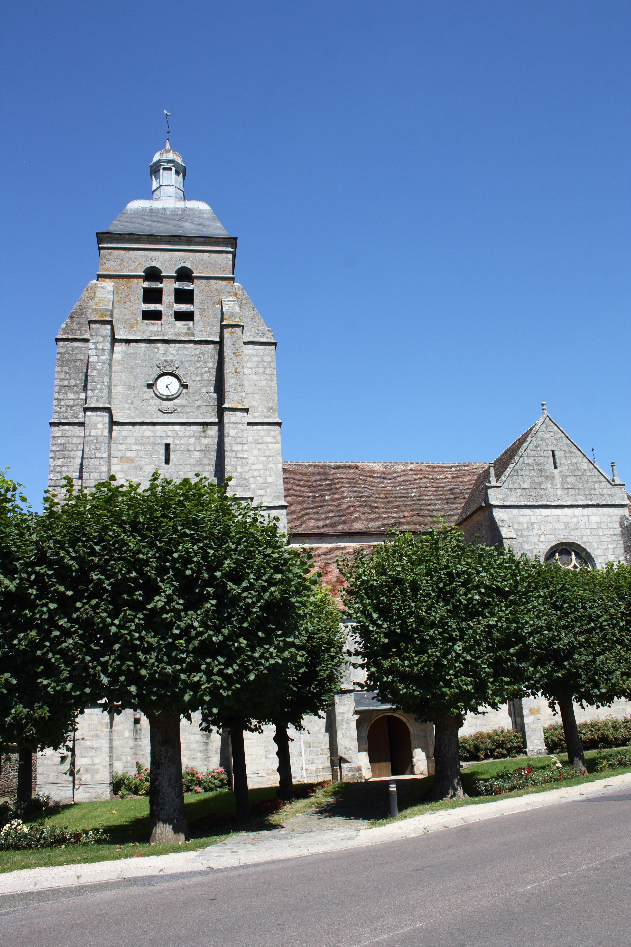 katholische Pfarrkirche Saint-Sulpice in Faremoutiers im Département Seine-et-Marne (Île-de-France)